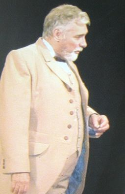 Ростислав Янковский в спектакле "Волки и овцы", 2007 год